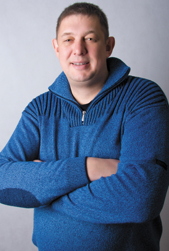 Олег Гребнев. Гандболист, заслуженный мастер спорта. Олимпийский чемпион (Барселона, 1992), четырехкратный чемпион мира, чемпион Европы. Фотография из серии «Лица эстафеты».